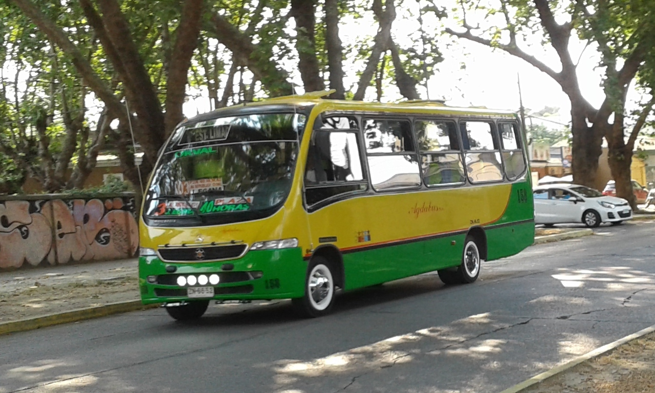 Agdabus en su recorrido por avenida Urmeneta, en Limache, Chile.